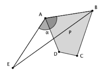 Figura corresponent al teorema 57 del llibre de Les Data d'Euclides